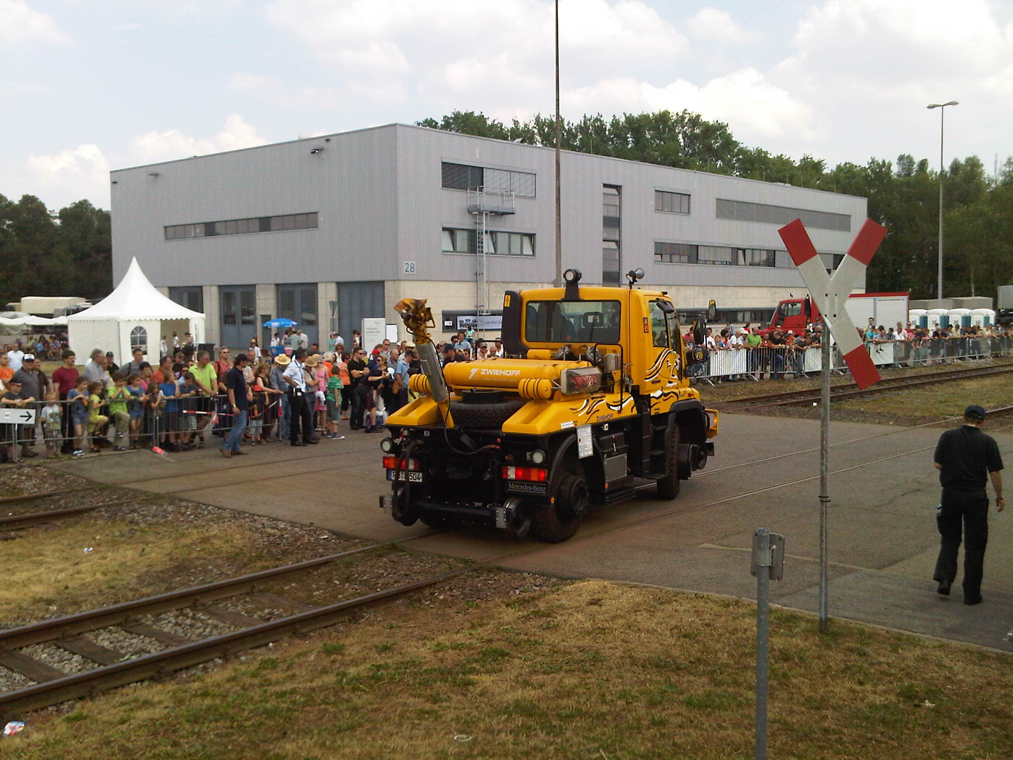 60 Jahre Unimog - Wörth 2011 102 2-Wege-Unimog